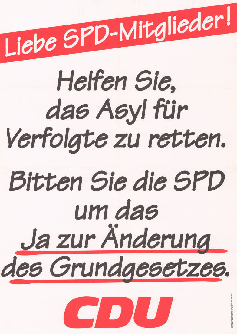 Liebe SPD-Mitglieder! Helfen Sie, das Asyl für Verfolgte zu retten. Bitten Sie die SPD um das Ja zur Änderung des Grundgesetzes. CDU Plakatart: Textplakat Allgemein Auftraggeber: CDU-Bundesgeschäftsstelle, Konrad-Adenauer-Haus, Bonn Drucker_Druckart_Druckort: Greven & Bechtold, Hürth Objekt-Signatur: 10-031 : 1028 Bestand: CDU-Plakate ( 10-031) GliederungBestand10-18: Textplakate Lizenz: KAS/ACDP 10-031 : 1028 CC-BY-SA 3.0 DE